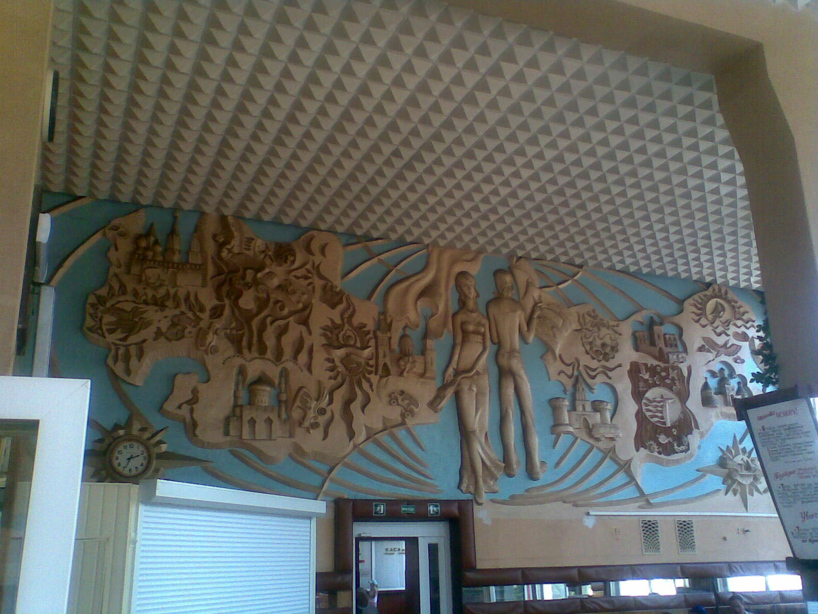 Часть барельефа на автовокзале Чернигове